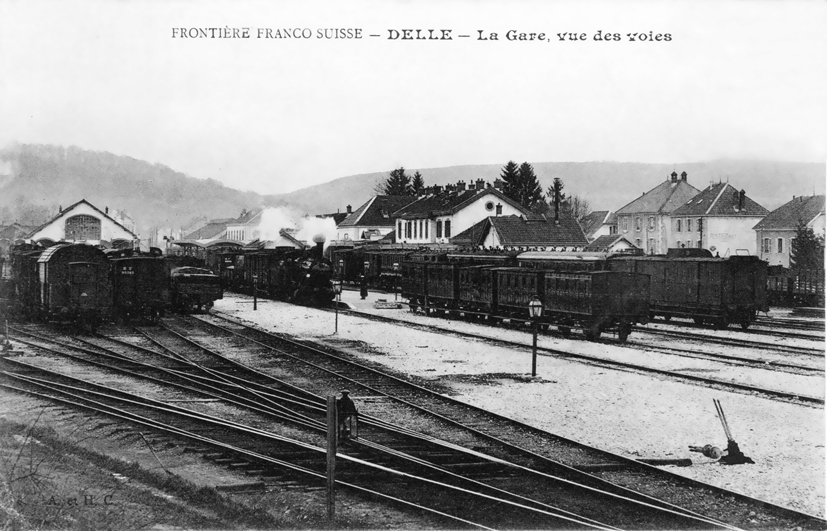 Carte postale présentant la Gare intérieure de Delle, voies, wagons, locomotive, bâtiments.